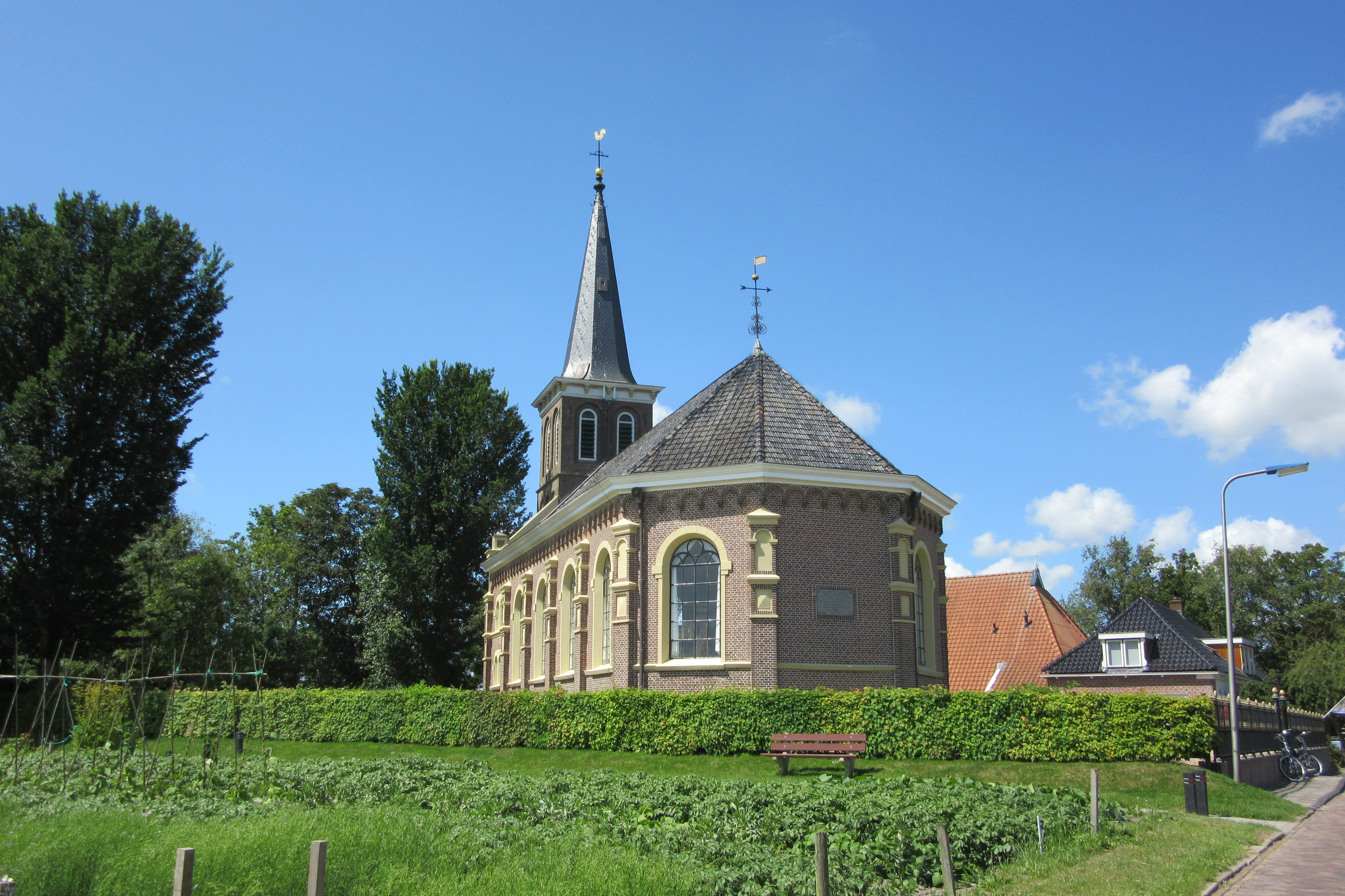 Baaium, Terp 21 - Ned. Hervormde Kerk - anno 1876